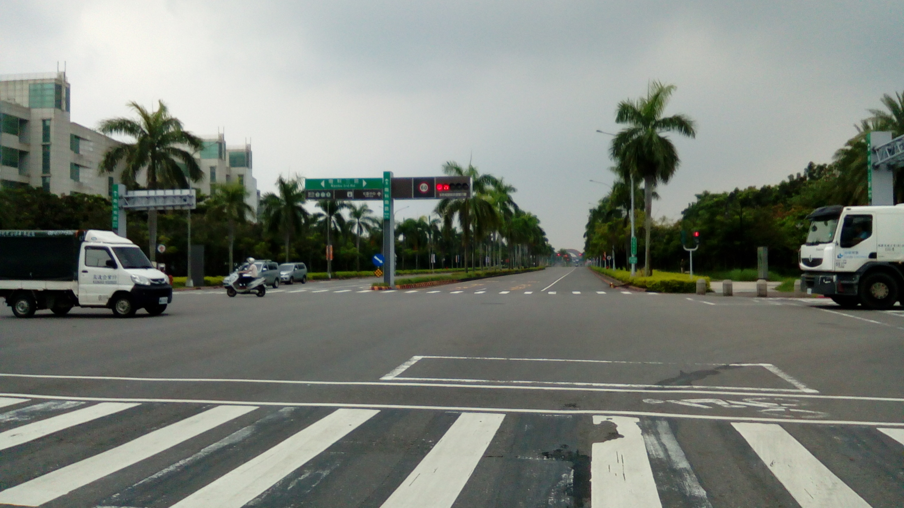 往新市及永康方向